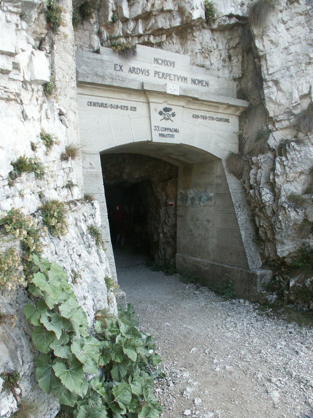 Strada delle 52 Gallerie - n. 1 - Cap. Zappa - 17 metri - Opera propria